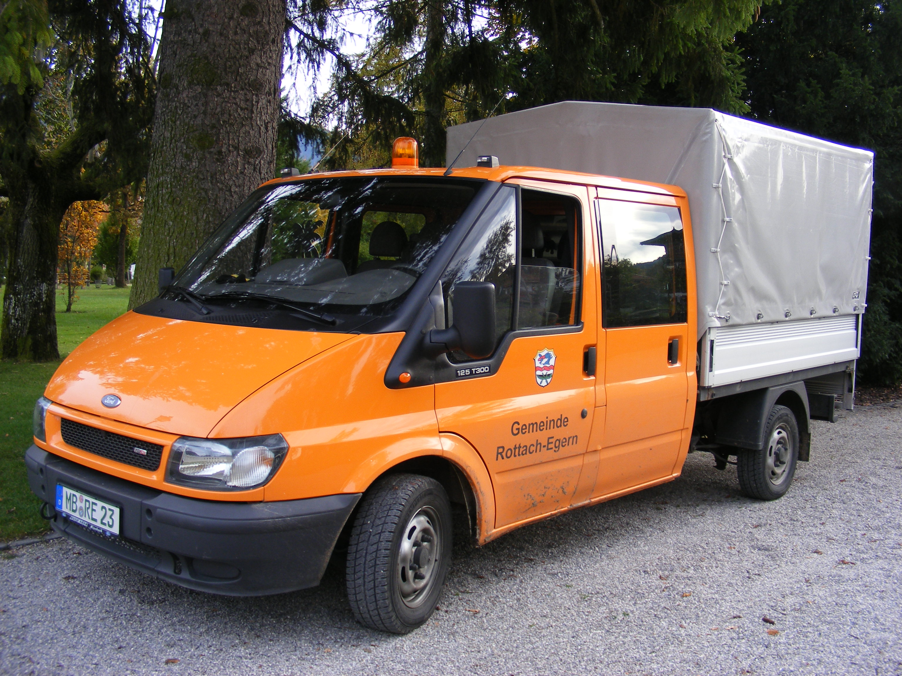 Ford Transit 125 T300 Pritsche (Bj. 2000 bis 2005) mit Doppelkabine der Gemeinde Rottach-Egern